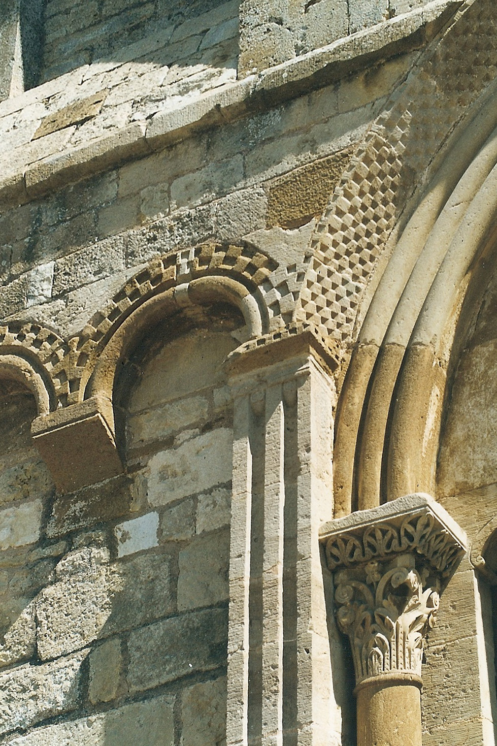 St.-André-de-Bâgé, Portalkapitell links